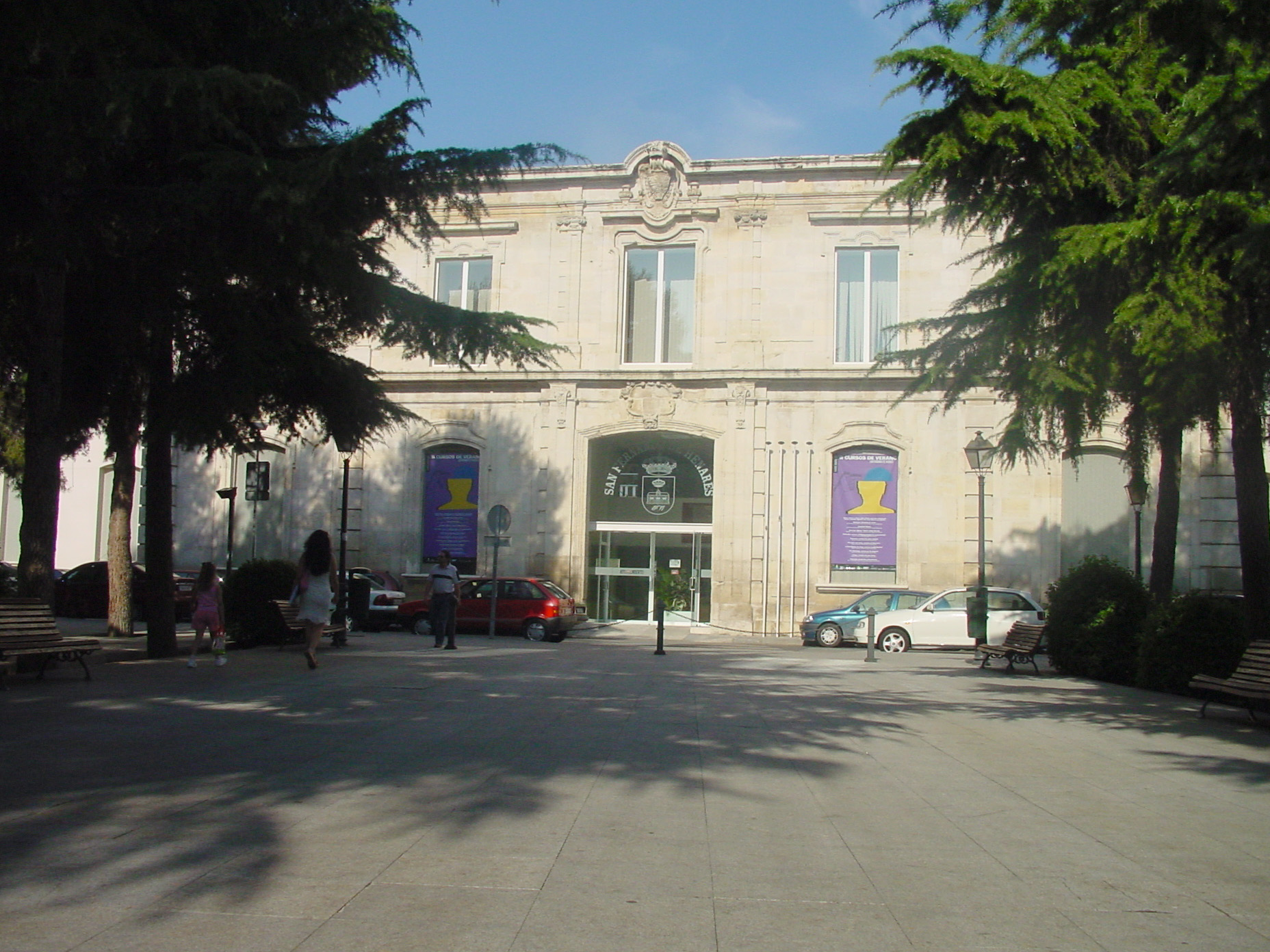 Ayuntamiento de San Fernando de Henares.